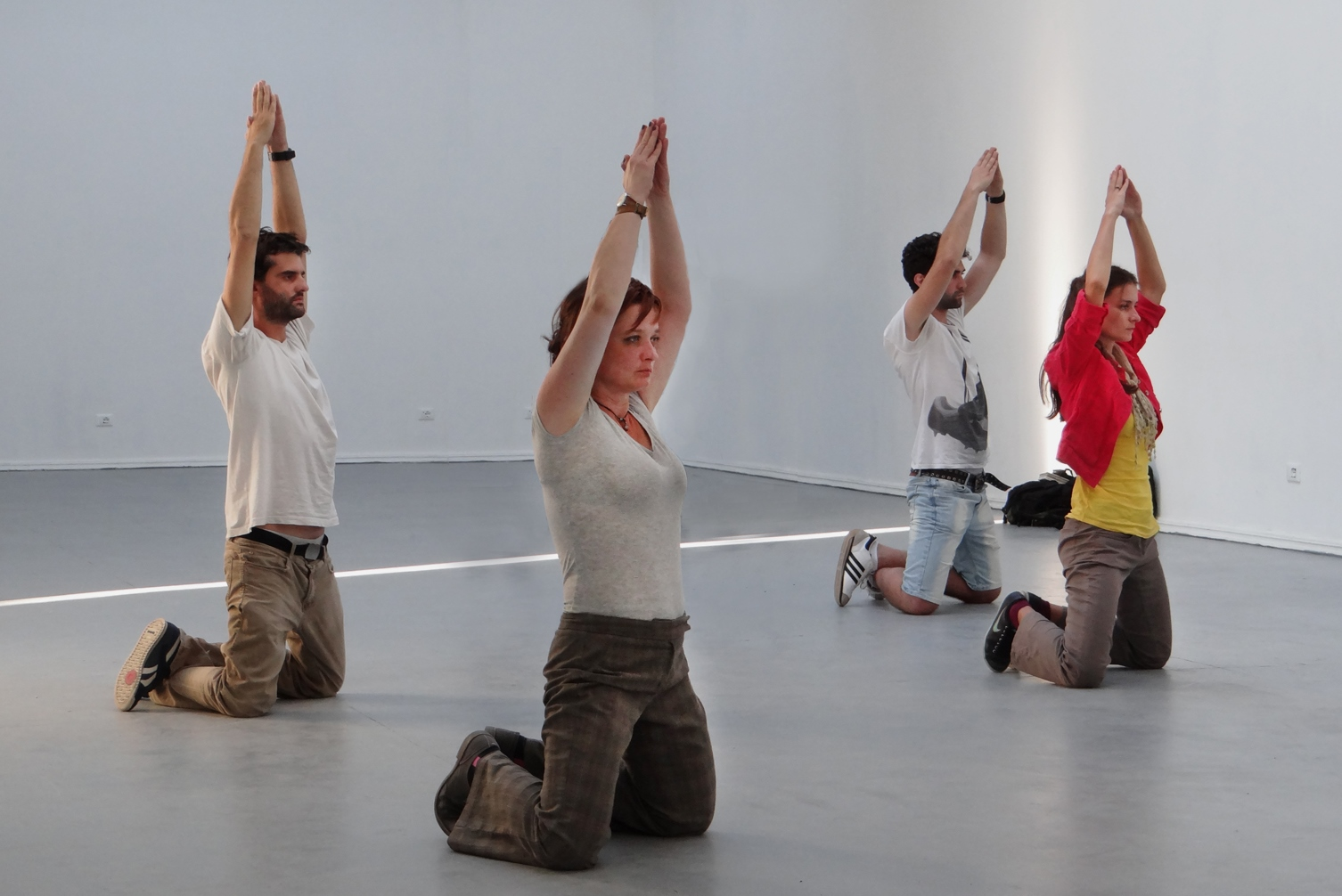 Le pavillon de la Roumanie est totalement vide, il ne renferme aucune œuvre matérielle Le choix a été d'organiser une rétrospective immatérielle de la Biennale de Venise en faisant jouer à des comédiens (performeurs) des scènes évoquant des œuvres d'art qui y ont été présentées. Le résultat est original et cette initiative renouvelle l'art de la performance. An immaterial retrospective of the Venice Biennale Alexandra Pirici, Manuel Pelmus Commissaire : Monica Morariu. Commissaire adjoint : Alexandru Damian. Curateur: Raluca